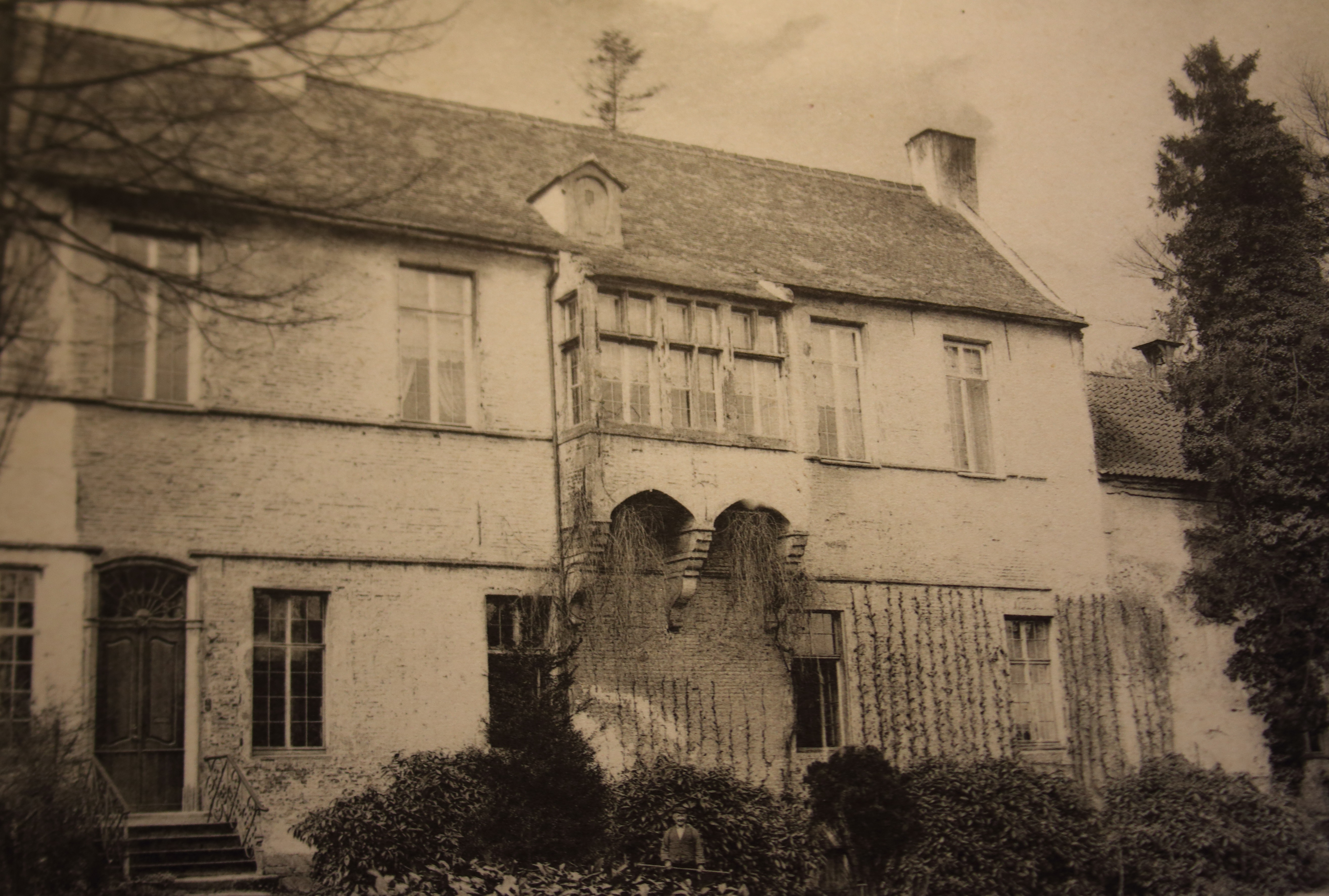 Egmontkasteel/ Kasteel van Egmont, Zottegem, Vlaanderen, België (historische prentbriefkaart)